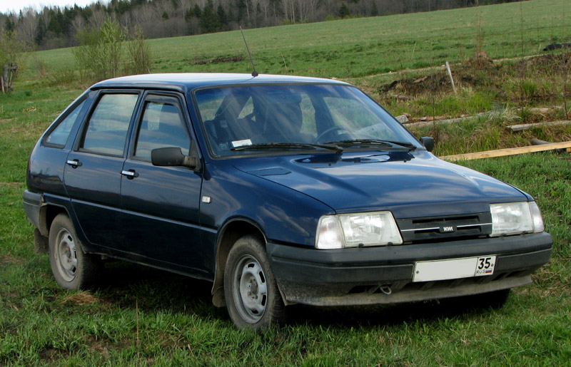 IZH 2126